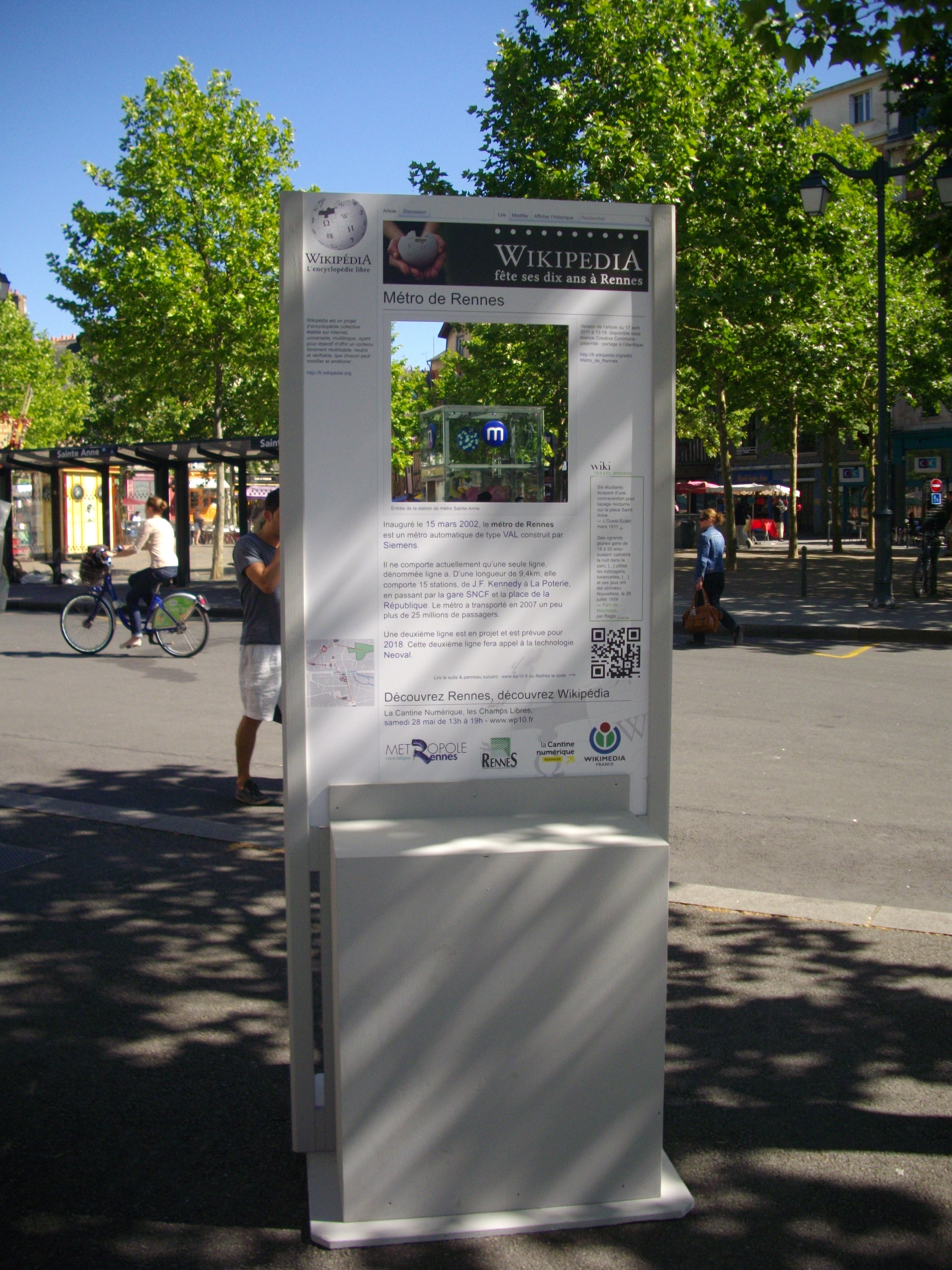 Panneau Wikipédia dans Rennes - Métro de Rennes